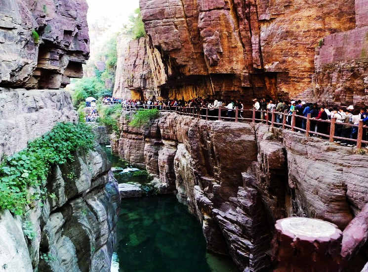 Yuntai mountain